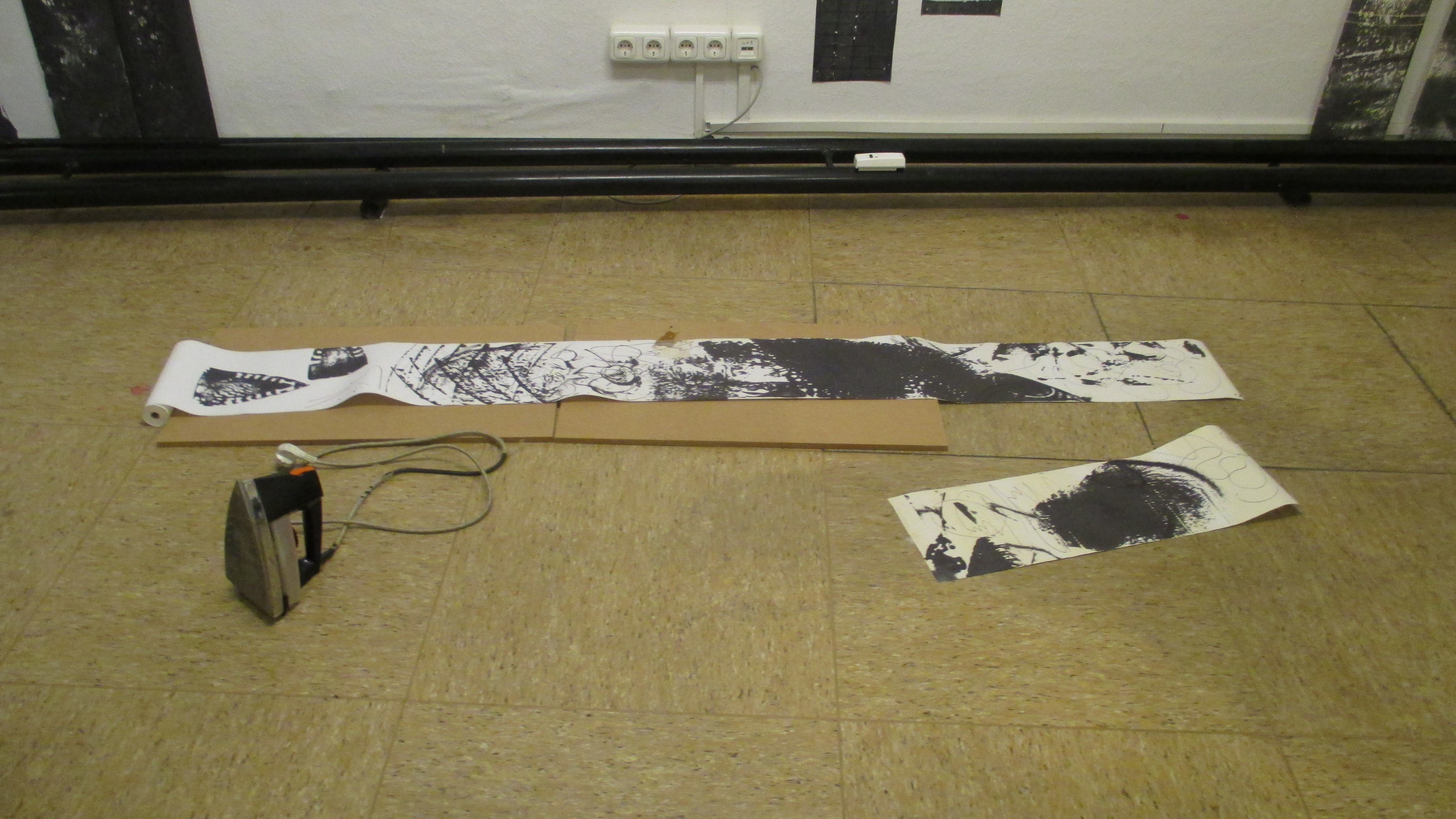 Makroscope - Useum für Fotokopie, Experimentelles Bügeln auf Thermopapier zur Erzeugung von Kunst.